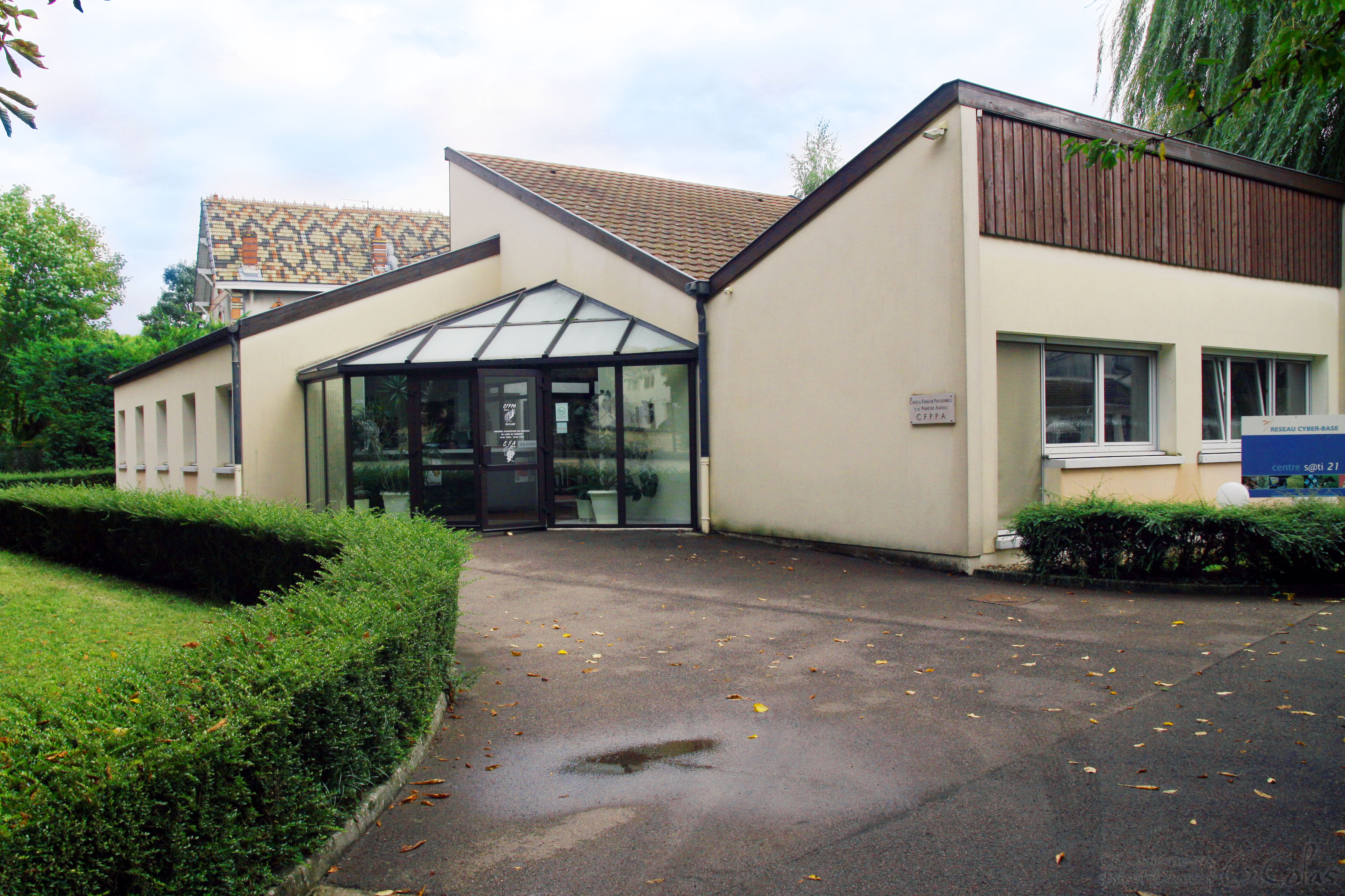 Batiment du Centre de Formation Professionnelle et de Promotion Agricole de la Viti